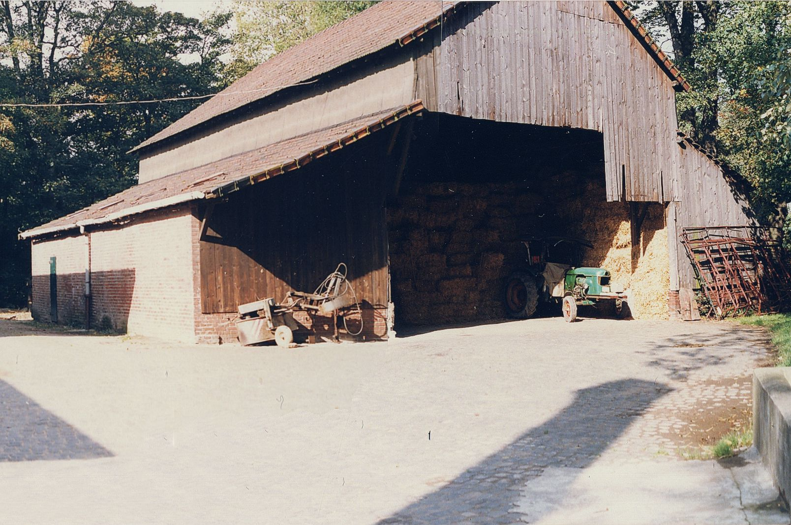 Haus Traar, ca. 1980, Scheune